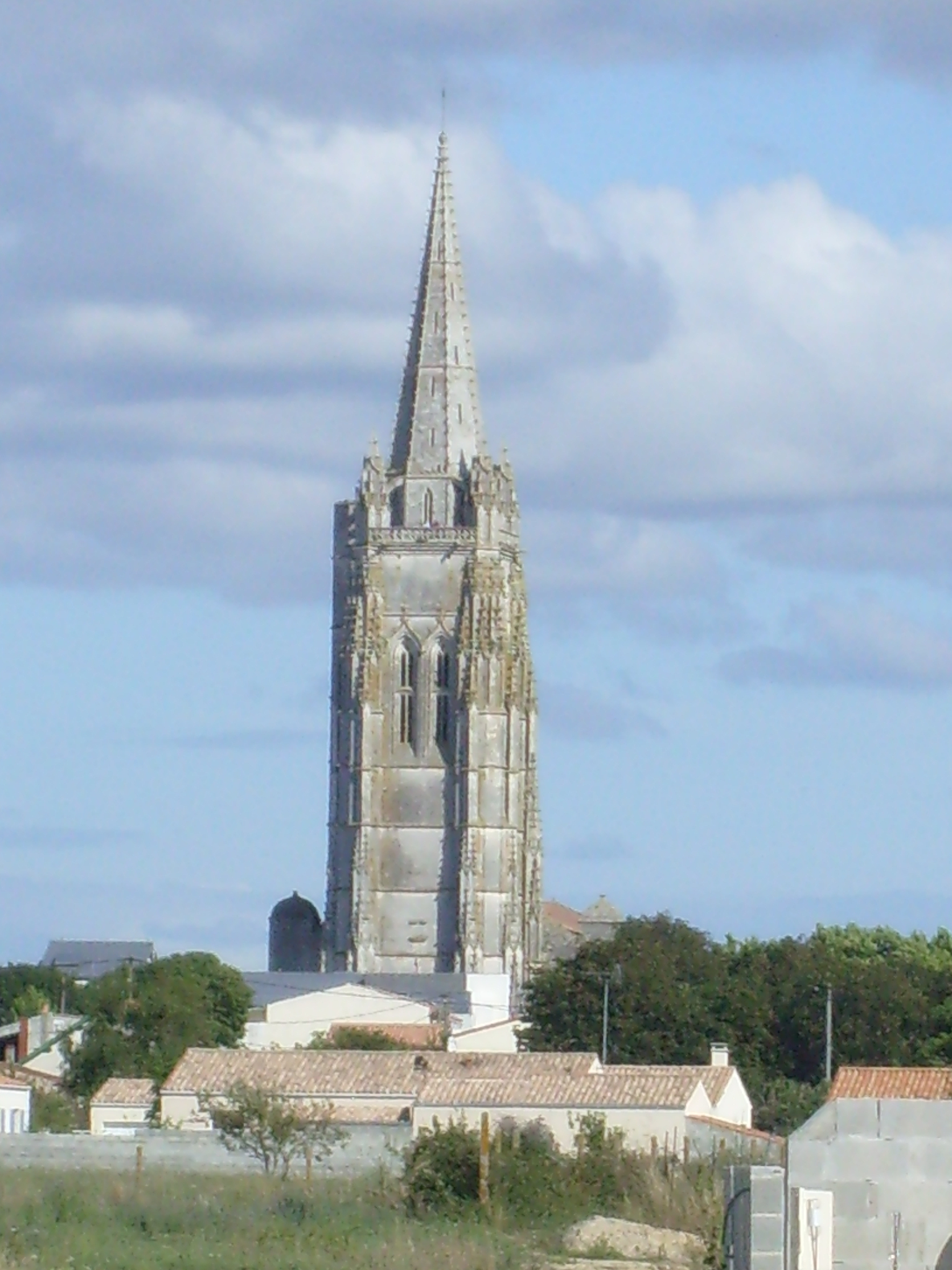 Eglise de Marennes